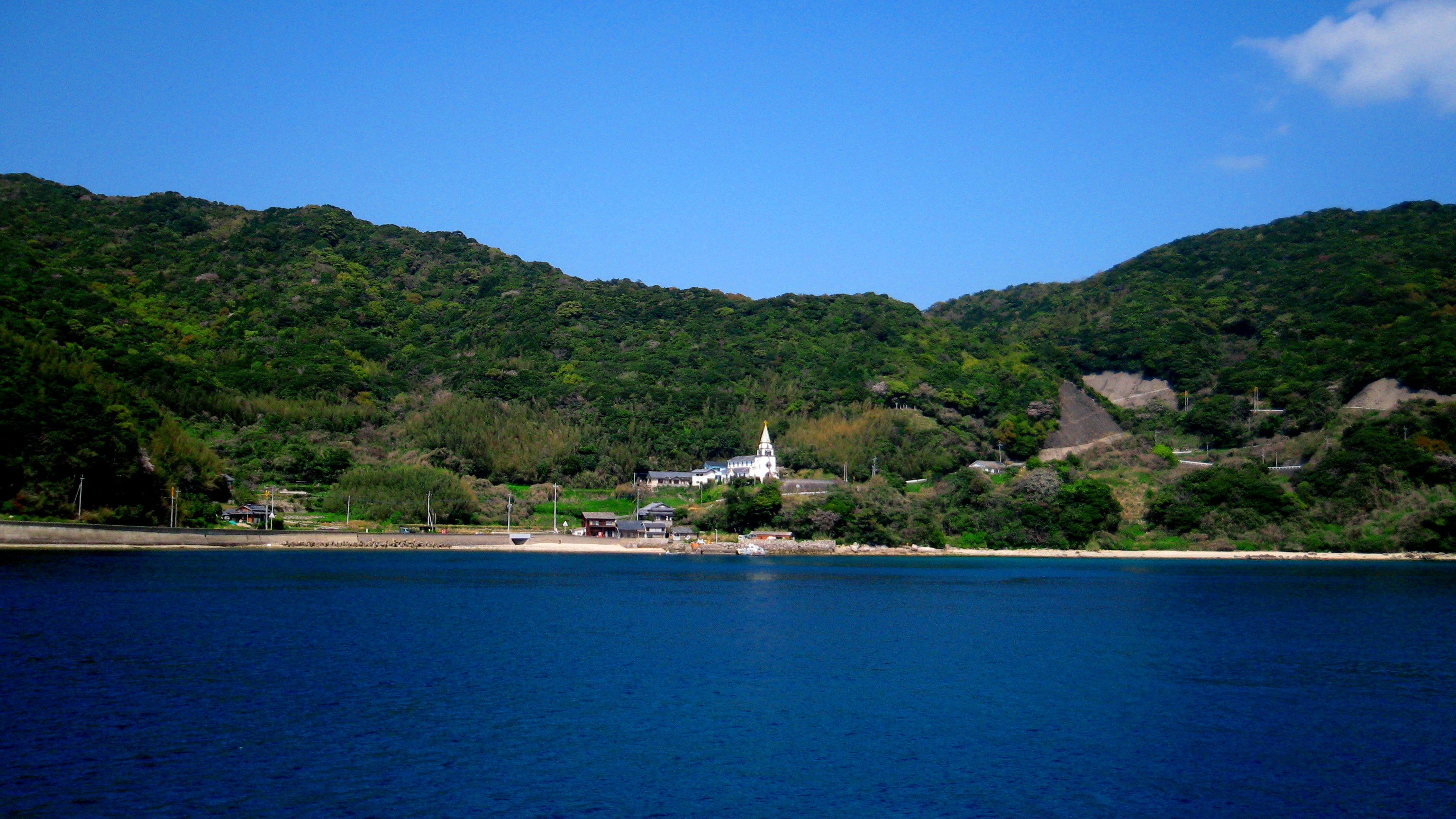 五島市田ノ浦町（久賀島）